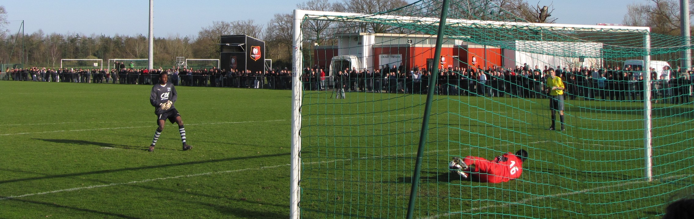 Tir au but du gardien rennais Abdoulaye Diallo face au Havrais Zacharie Boucher lors du huitième de finale de Coupe Gambardella 2009 Rennes - Le Havre au centre d'entraînement de la Piverdière